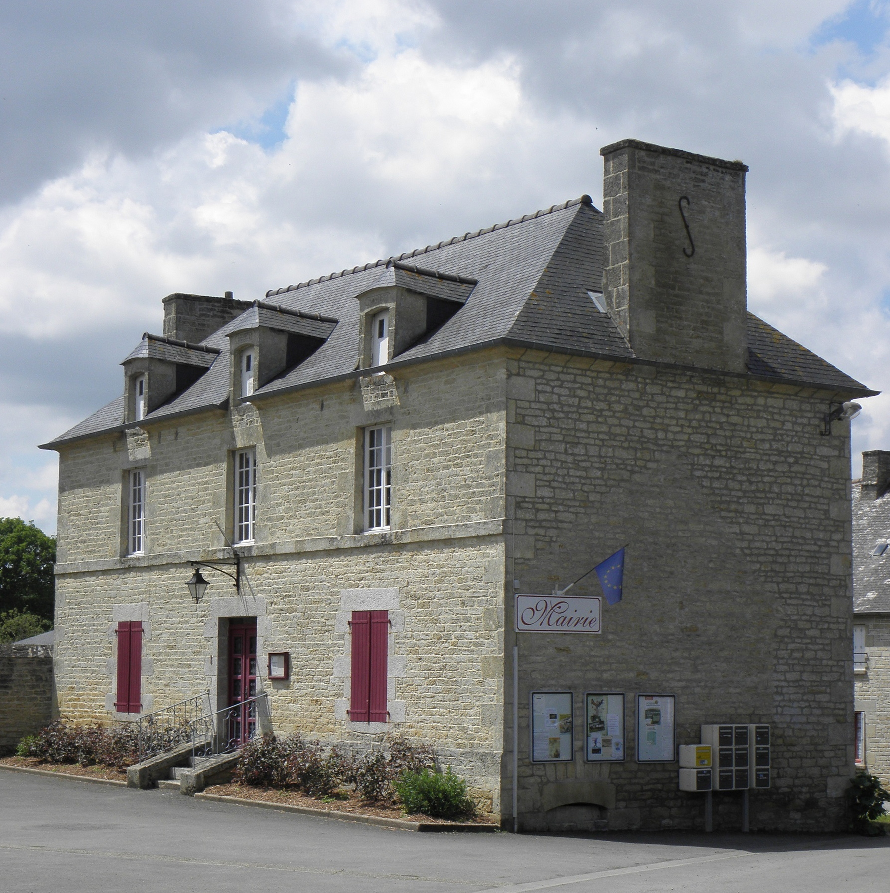 Ancien presbytère, actuellement mairie du Quiou (22).